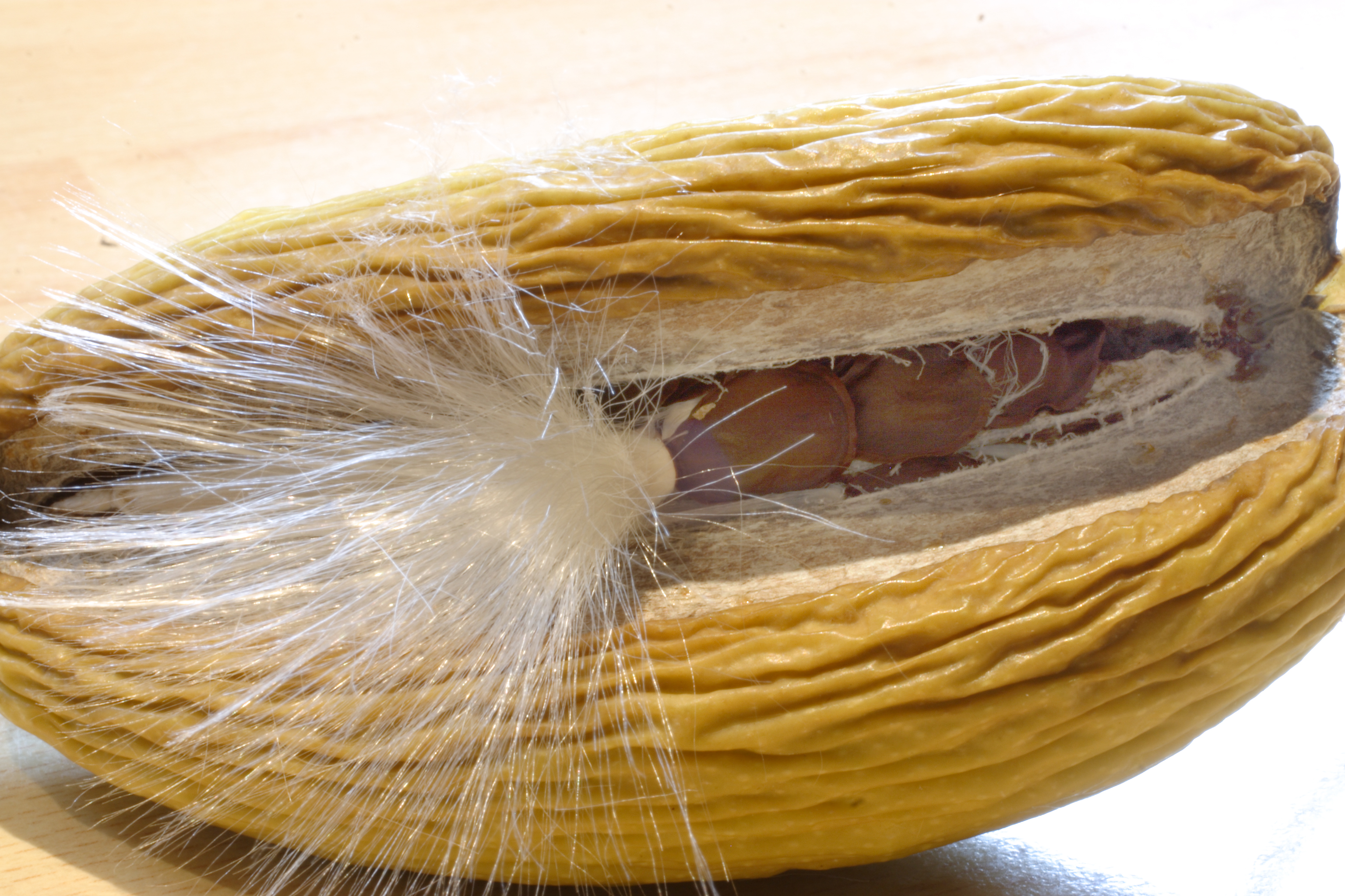 Stephanotis spec., Frucht